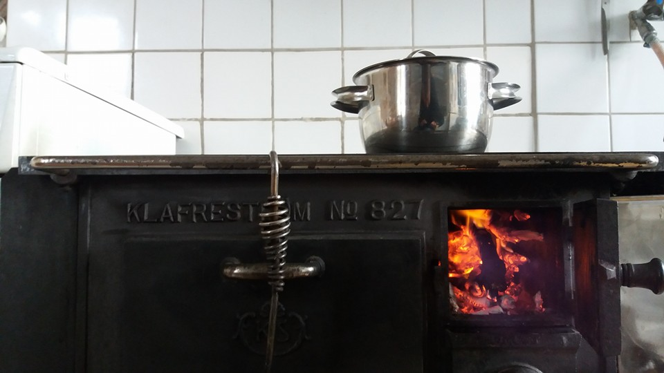 Klafreströms vedspis no 827 på torpet Viljet i Götala, Skara.